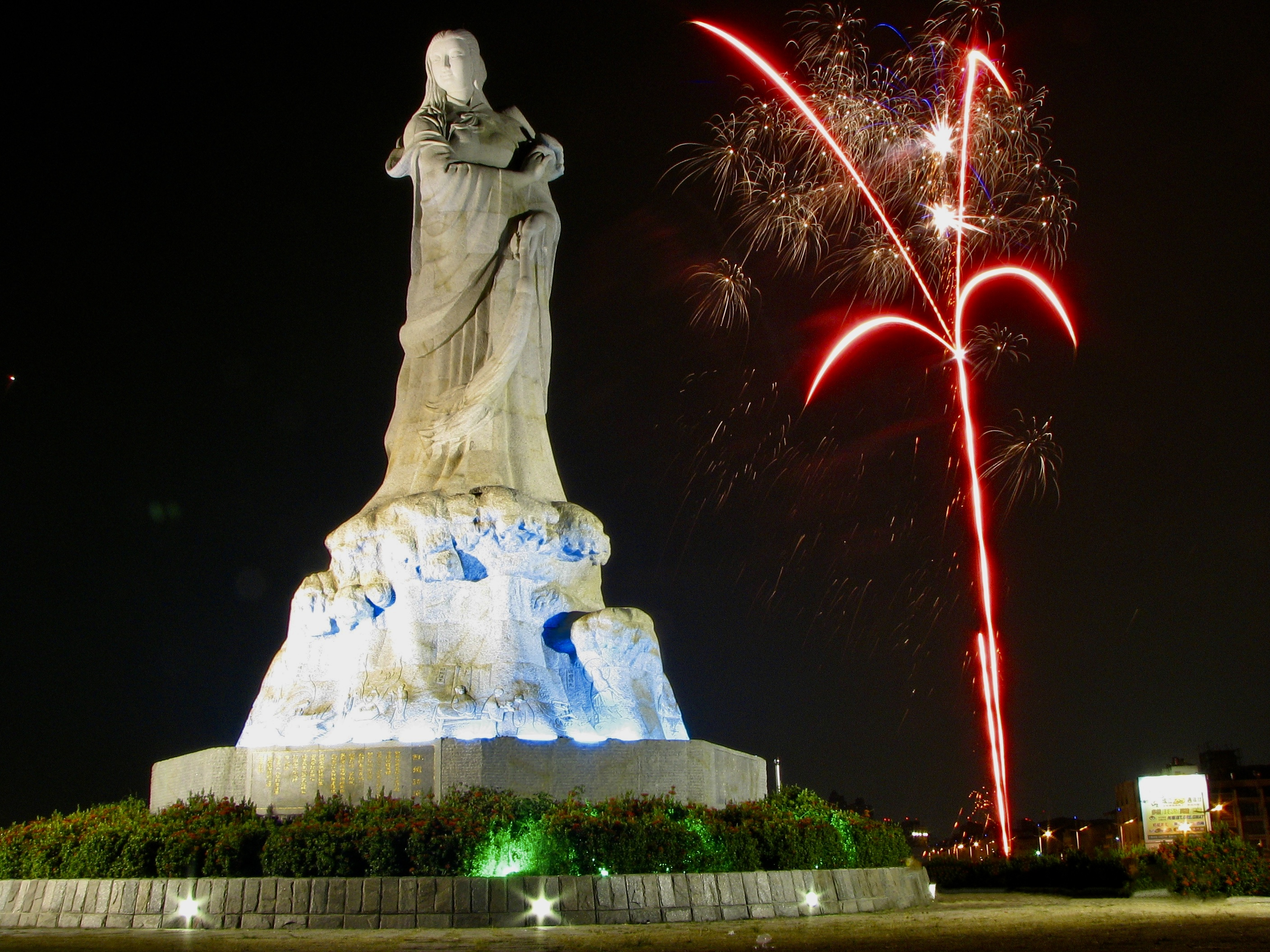 Goddess Mazu Statue in Tainan